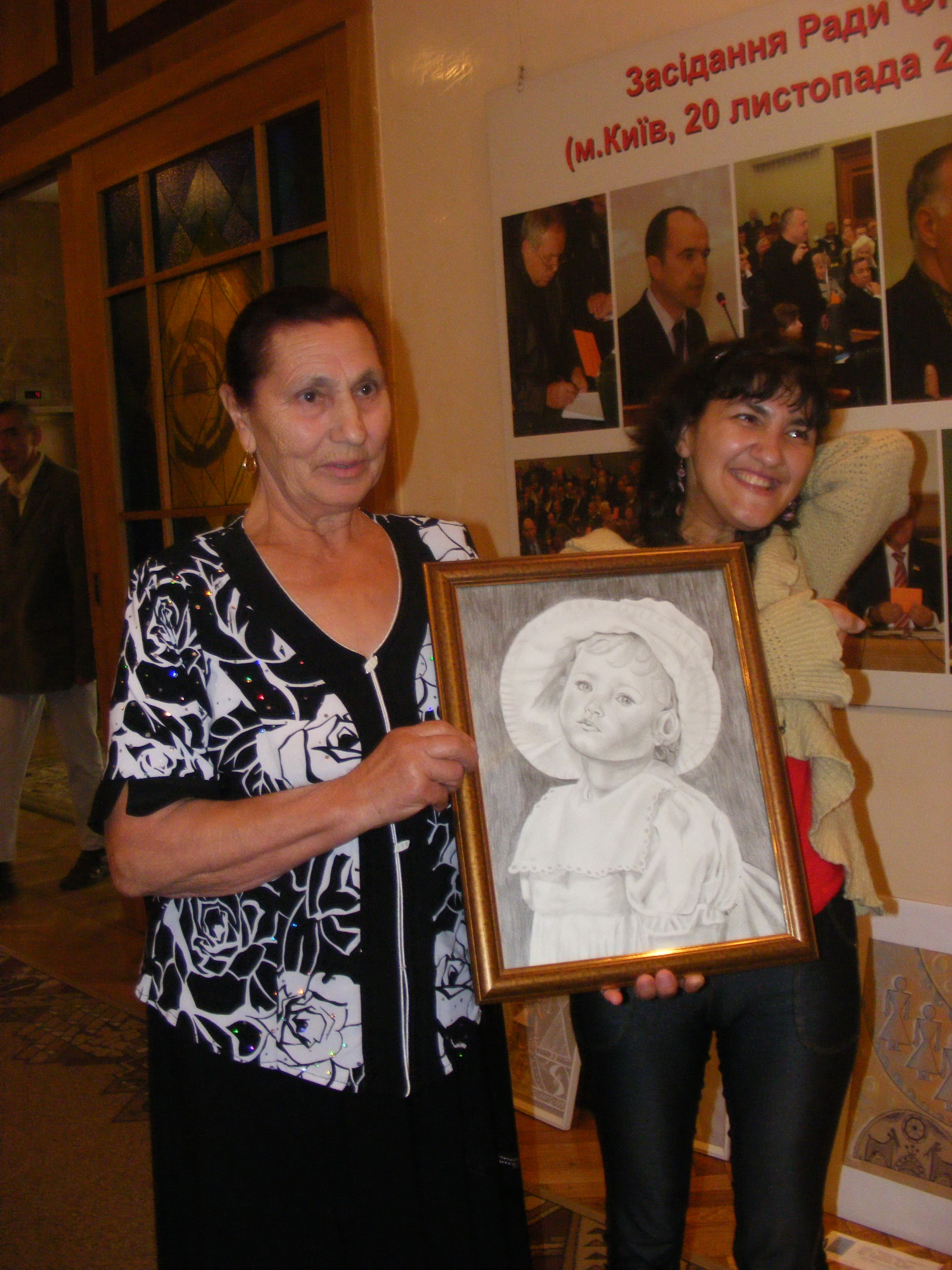 Любов Дмитренко, Євпаторія (справа) зі своєю картиною. Ця дівчина малює картини ногою, оскільки у неї не працюють руки